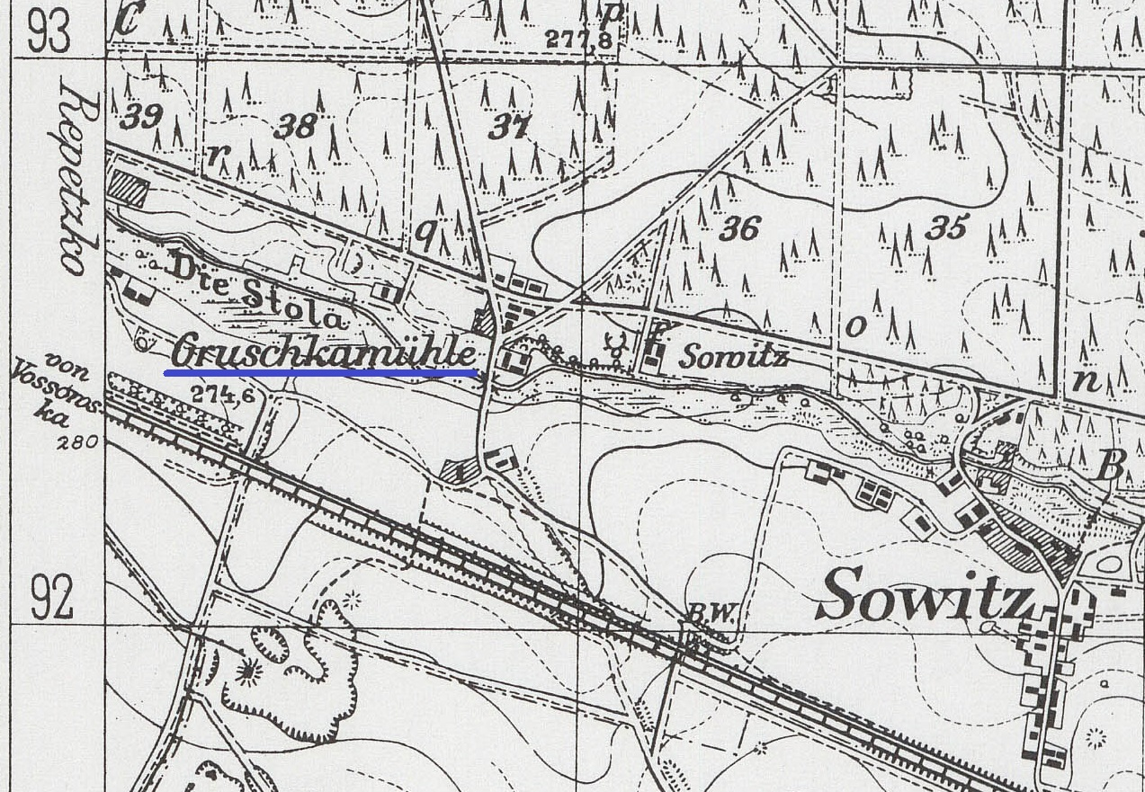 Fragment niemieckiej mapy Górnego Śląska z 1940 roku (na podstawie pruskiej mapy z 1883 roku) z miejscowościami Sowice (niem. Sowitz) i Puferki (niem. Gruschkamühle; zaznaczone na niebiesko) koło Tarnowskich Gór